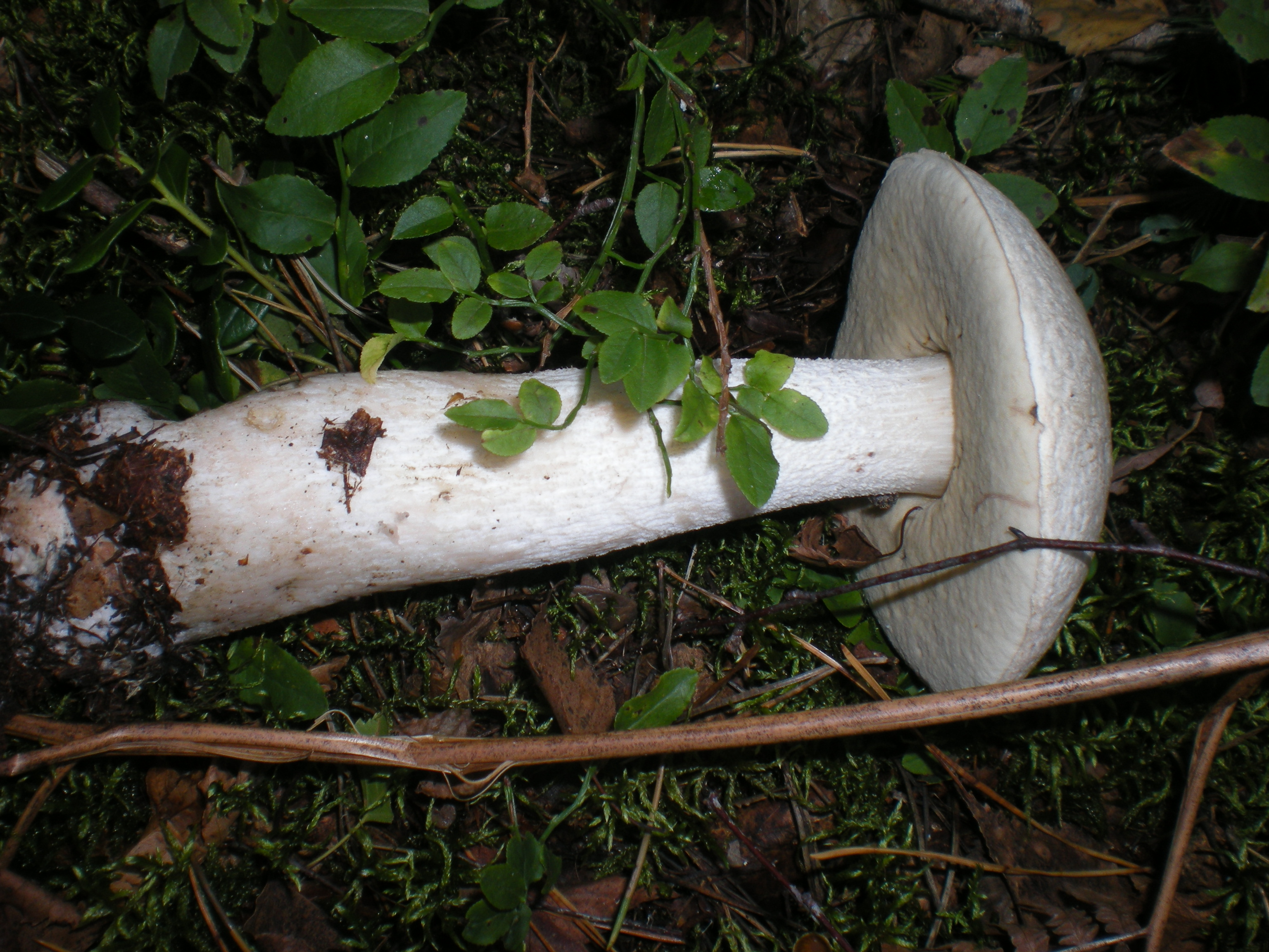 Weißer Birkenpilz (Leccinum percandidum)